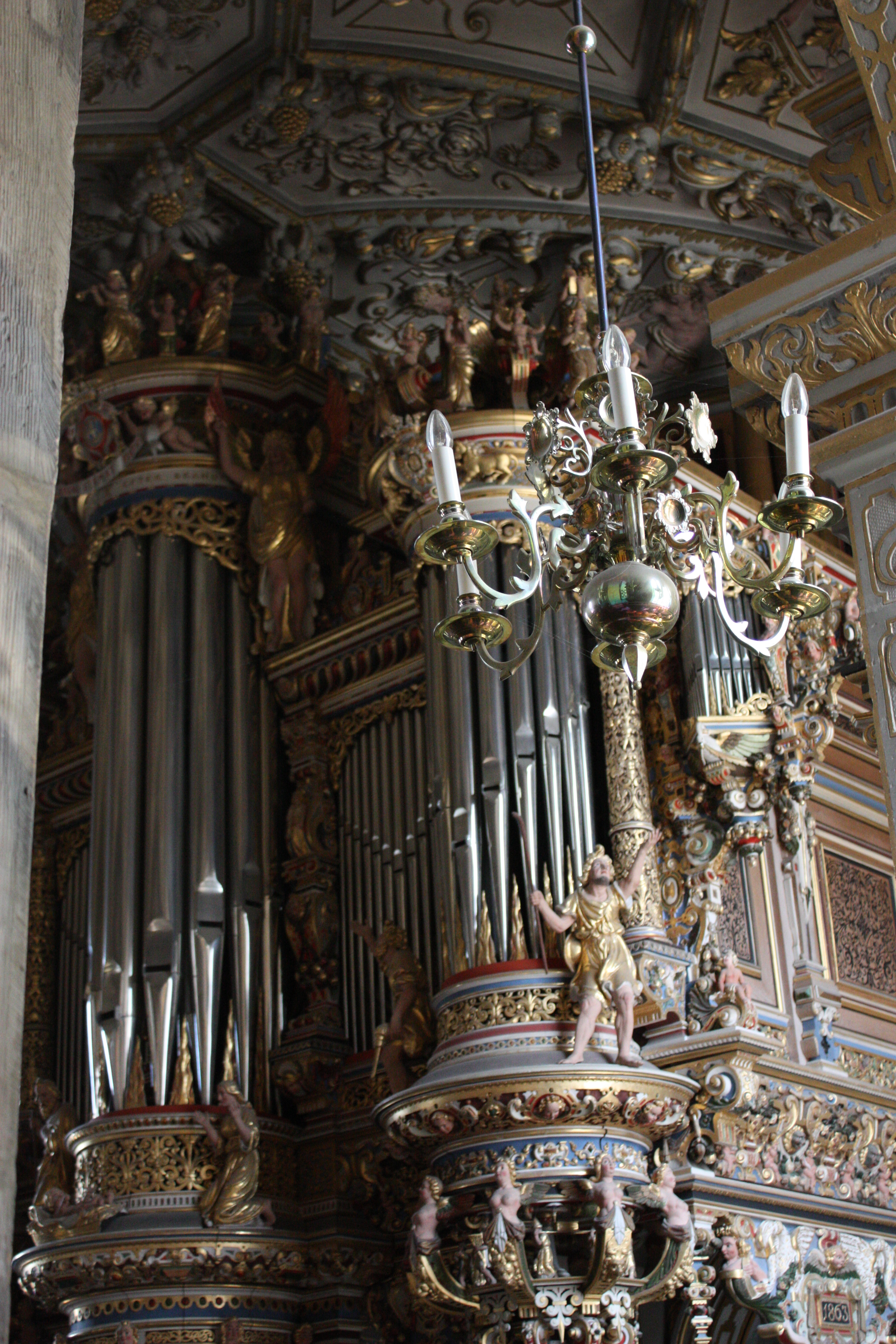 August 2009